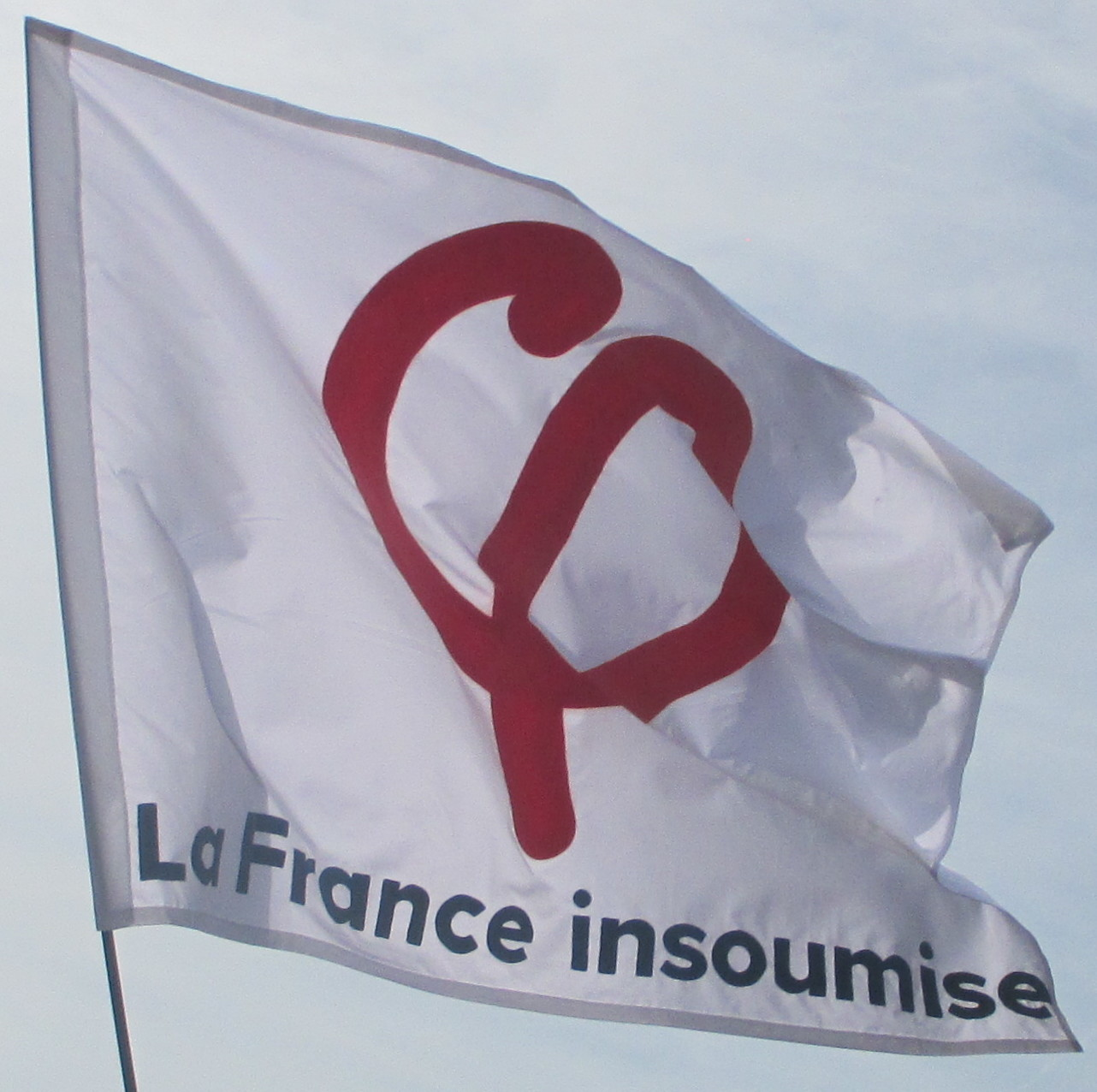 Drapeau de la France insoumise, place de la Bastille (Paris, France), lors de la marche du 23 septembre 2017 contre le Coup d'État social et la politique d'Emmanuel Macron, organisée par La France insoumise.